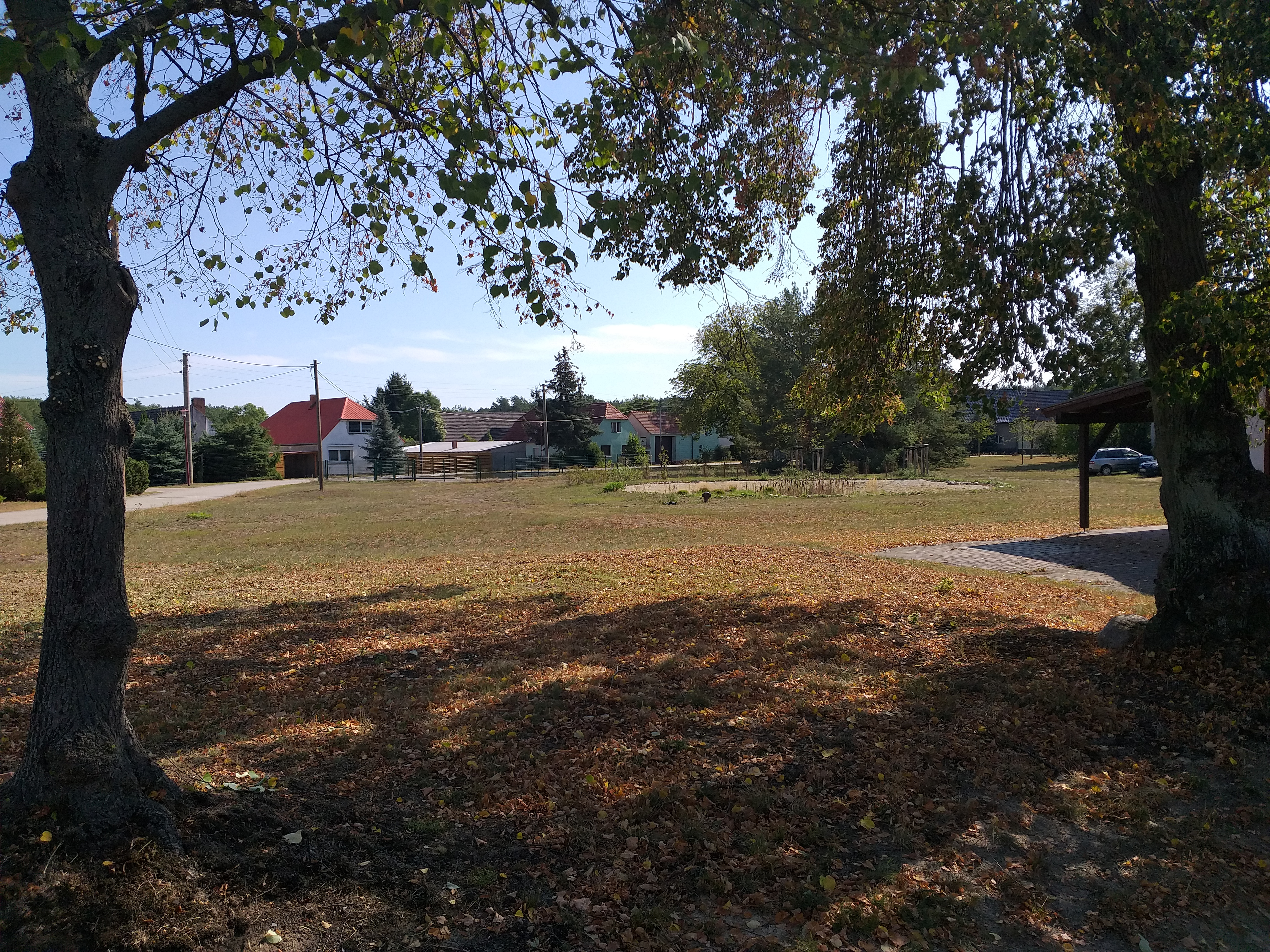 Dorfanger mit Dorfteich in Alteno, einem Gemeindeteil von Luckau in Brandenburg.